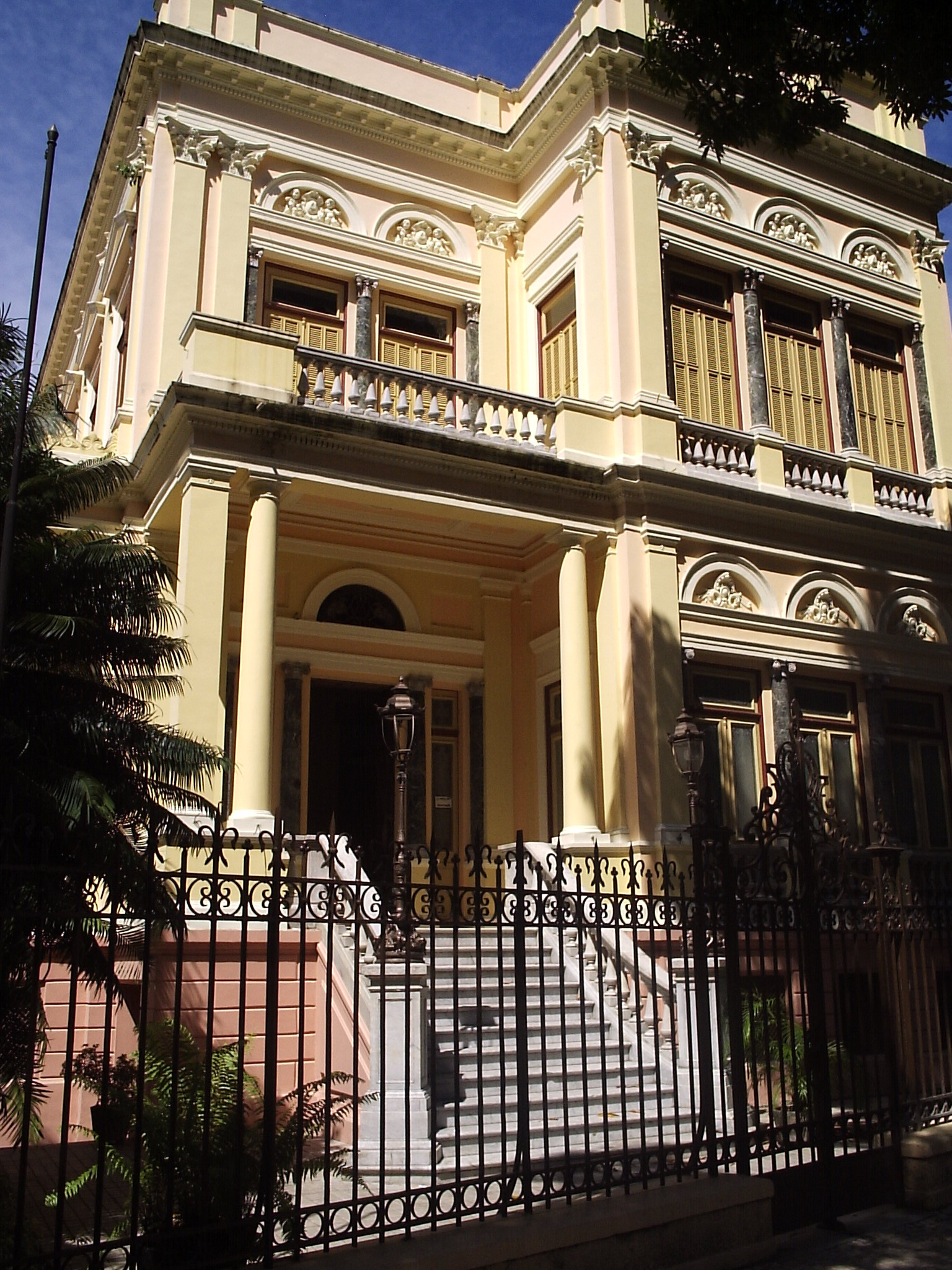 Foto da parte frontal do museu pela avenida José Malcher